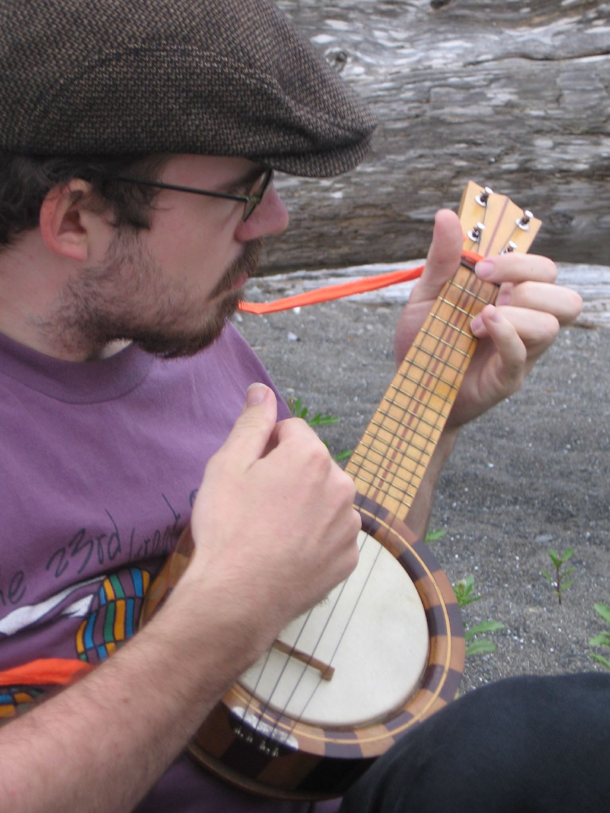 Banjo ukulele player